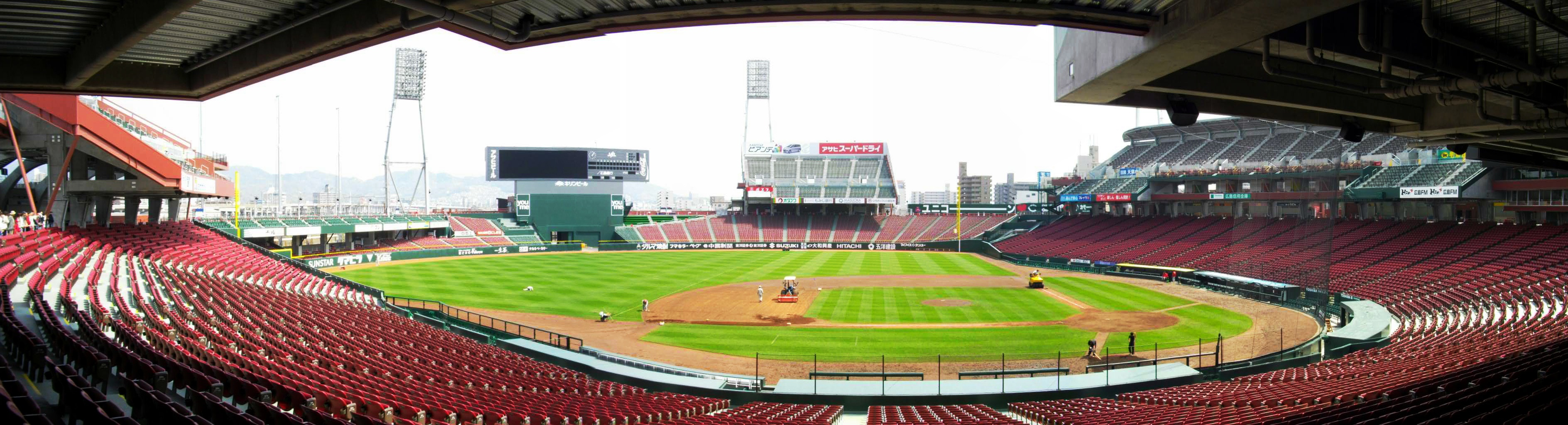 Hiroshima Municipal Baseball Stadium (新広島市民球場) 2009年4月5日、本人撮影